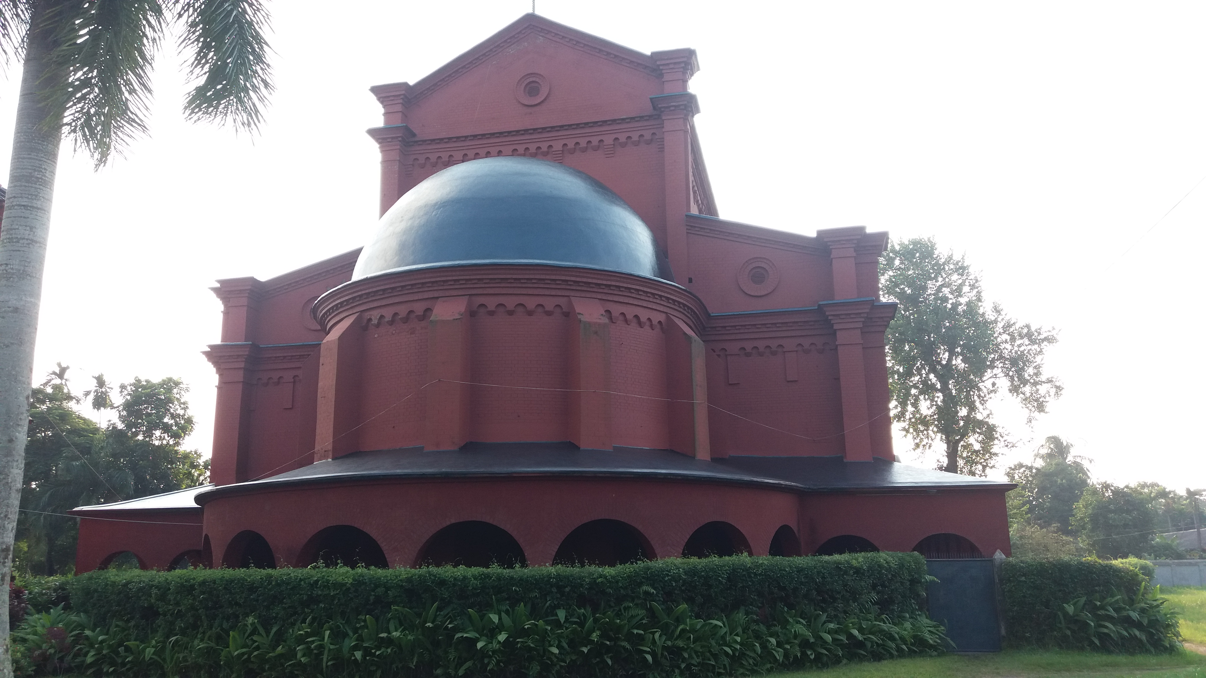 অক্সফোর্ড মিশন গির্জা বরিশাল।